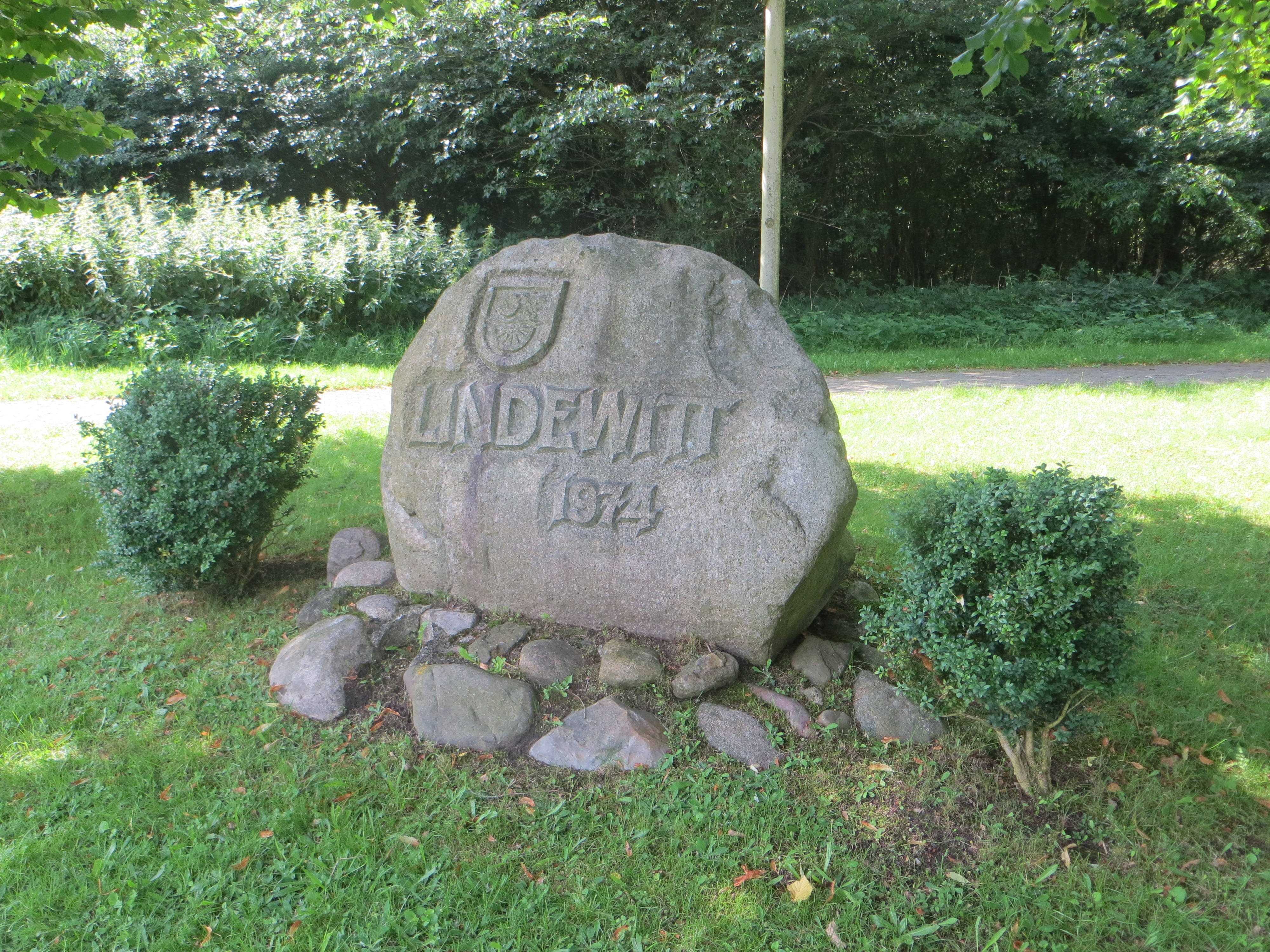 Gemeindestein zur Erinnerung an die Reform von Lindewitt im Jahre 1974